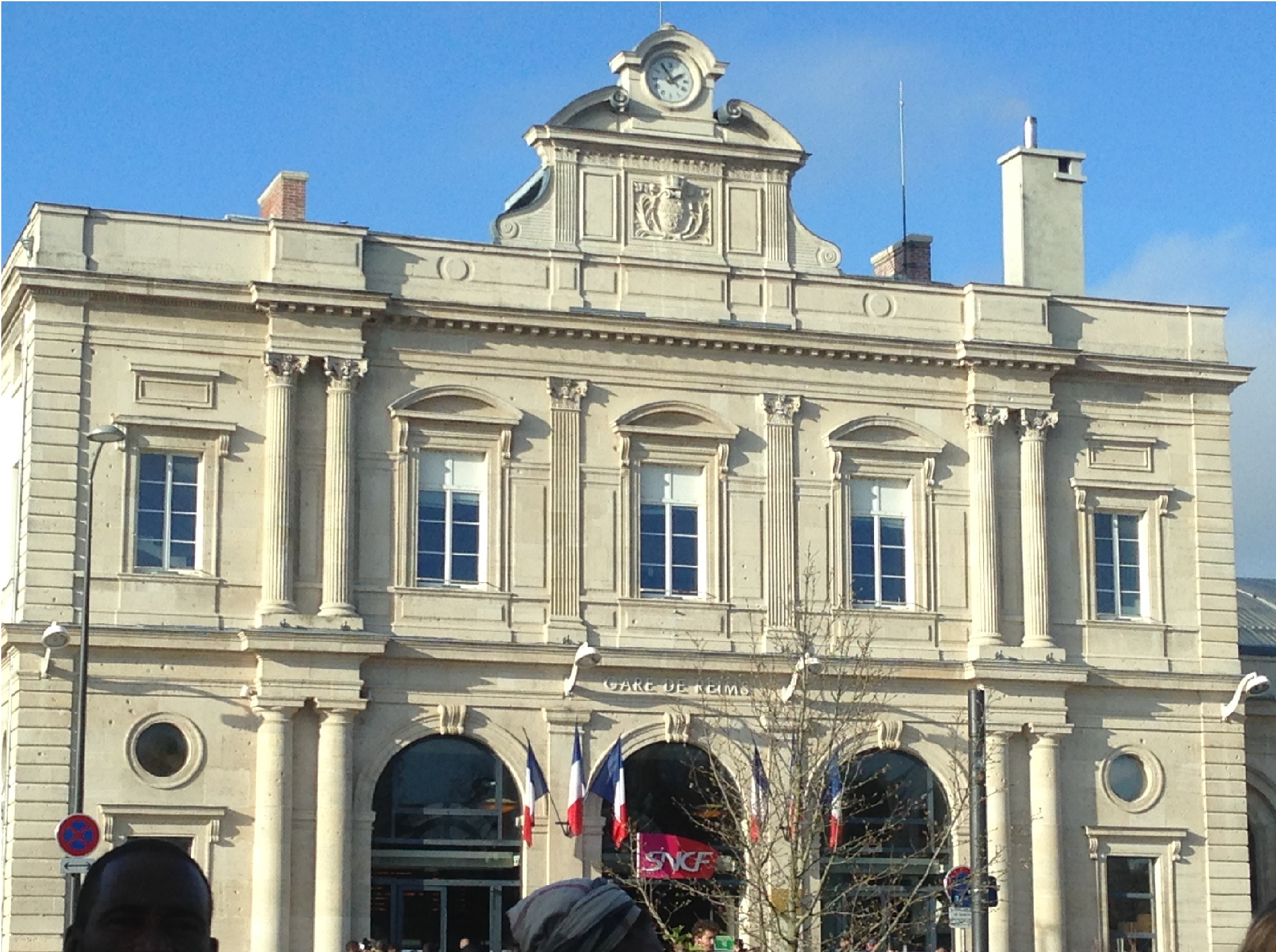 Gare de Reims-2015